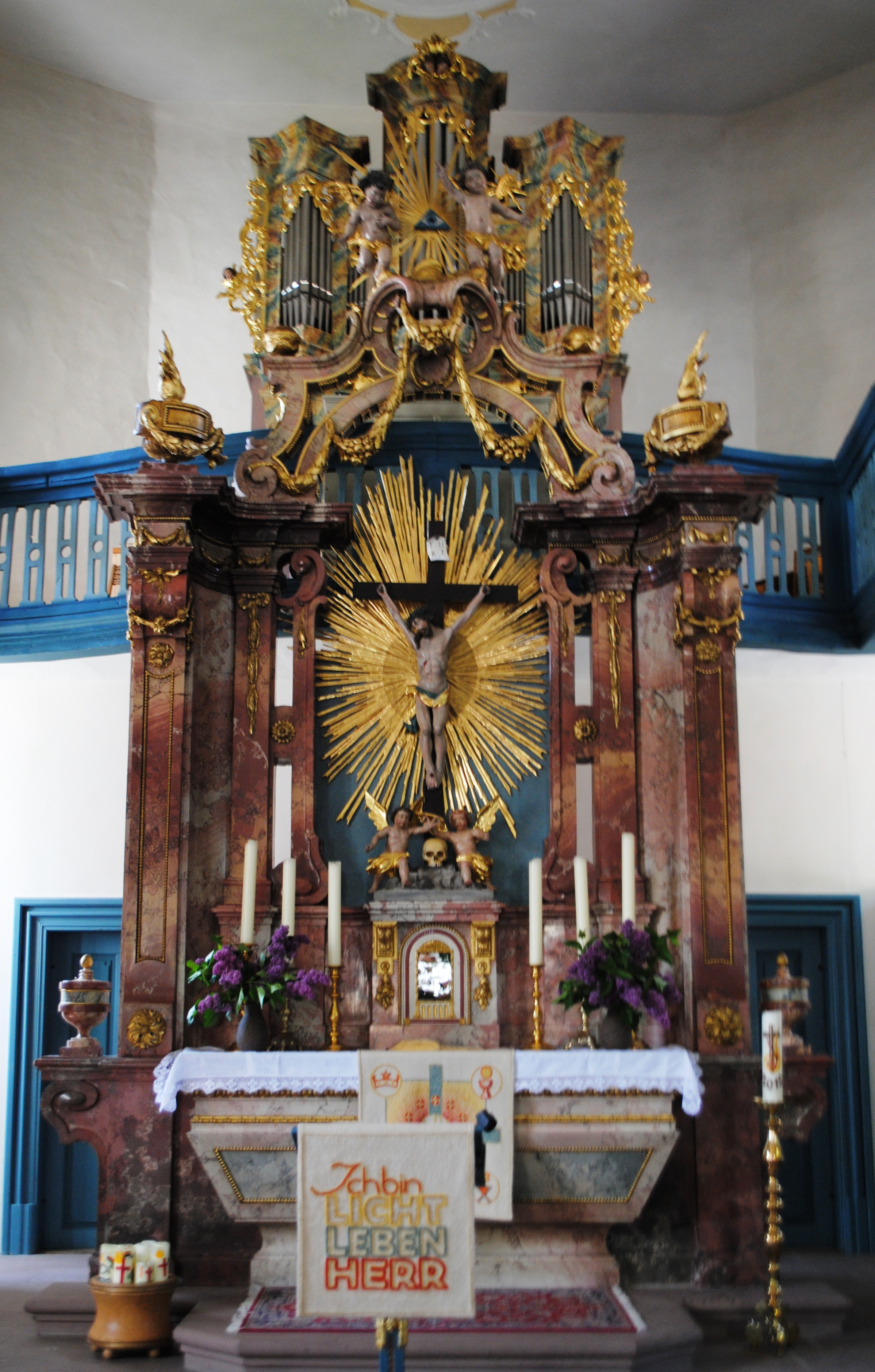 Innenausstattung Kirche St. Andreas, Schernau (Dettelbach), Hochaltar, Orgel